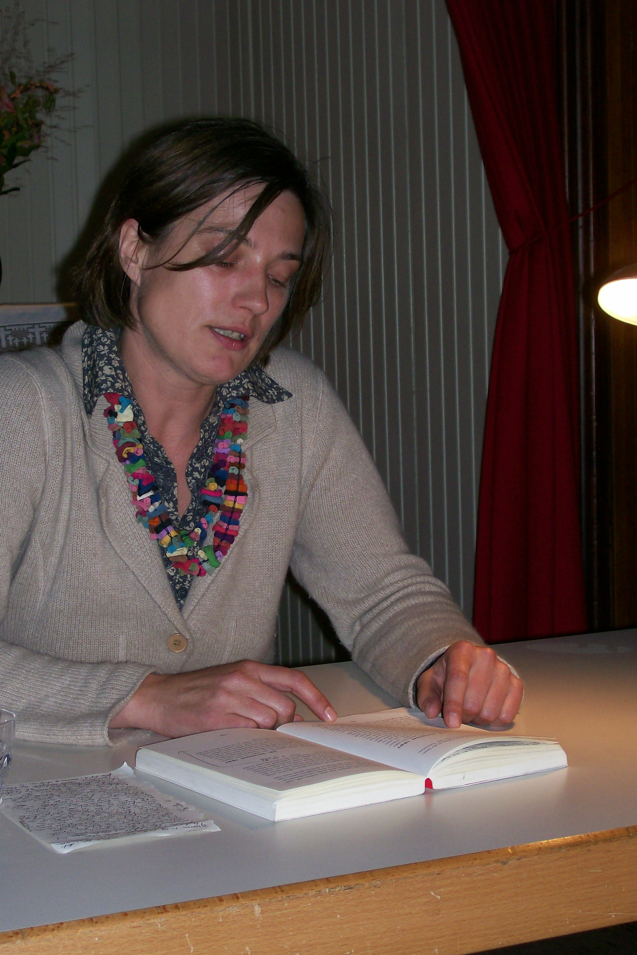 Barbara Bollwahn (* 1964) bei einer Lesung in der Flussschifferkirche in Hamburg am 3. Oktober 2007